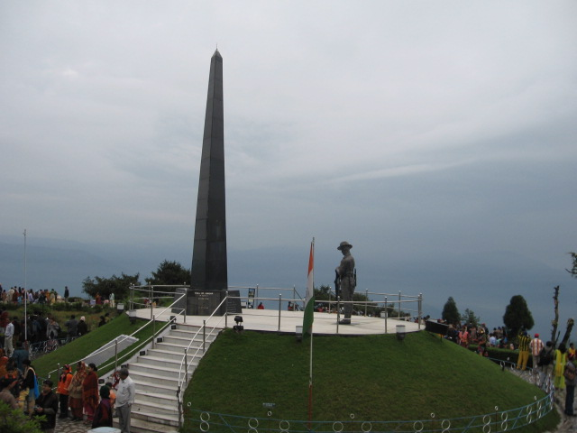 War Memorial at Batasia, Ghum, Darjeeling